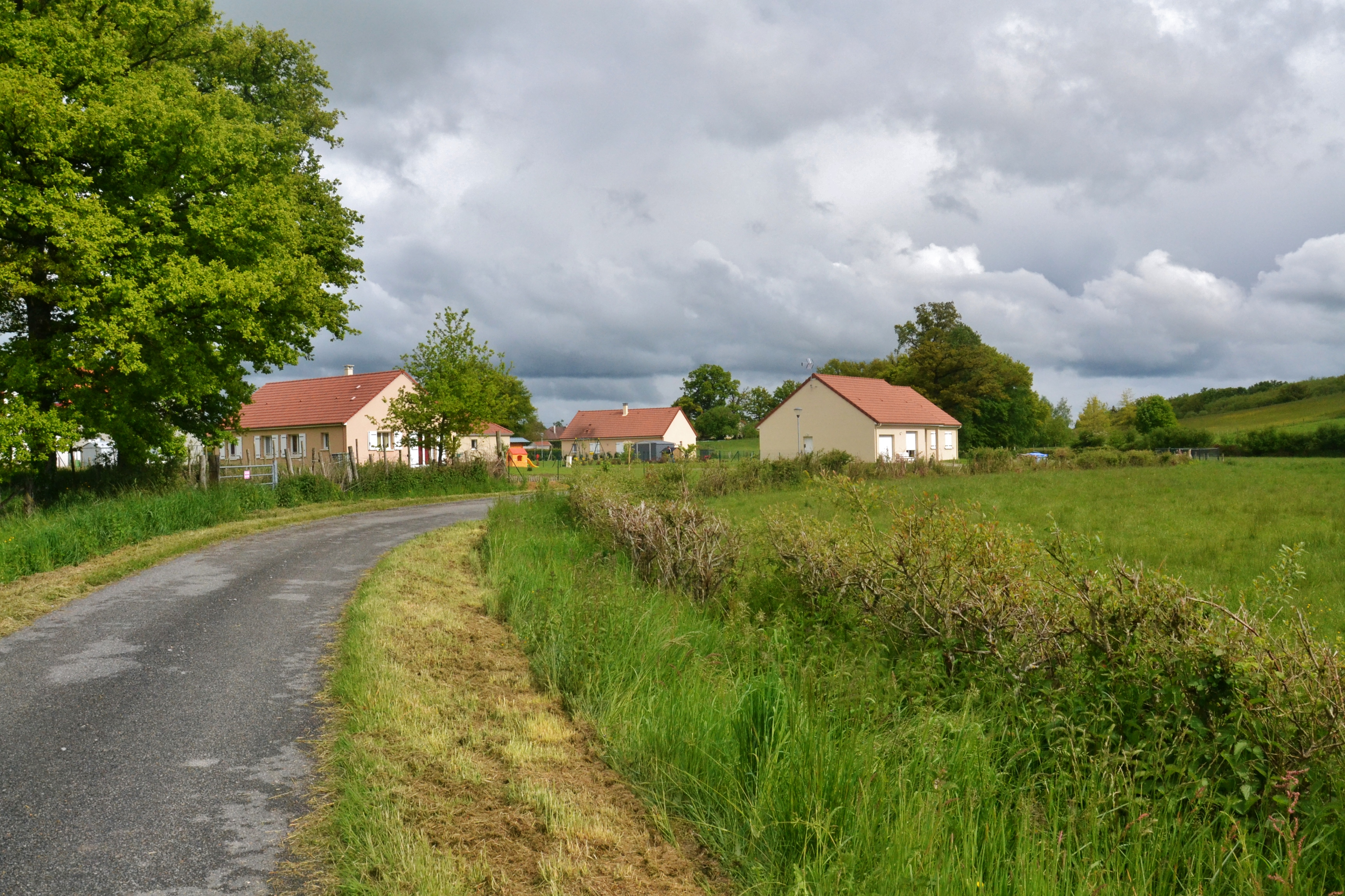 Pavillons récents à Saint-Maurice-la-Souterraine (Creuse, France)